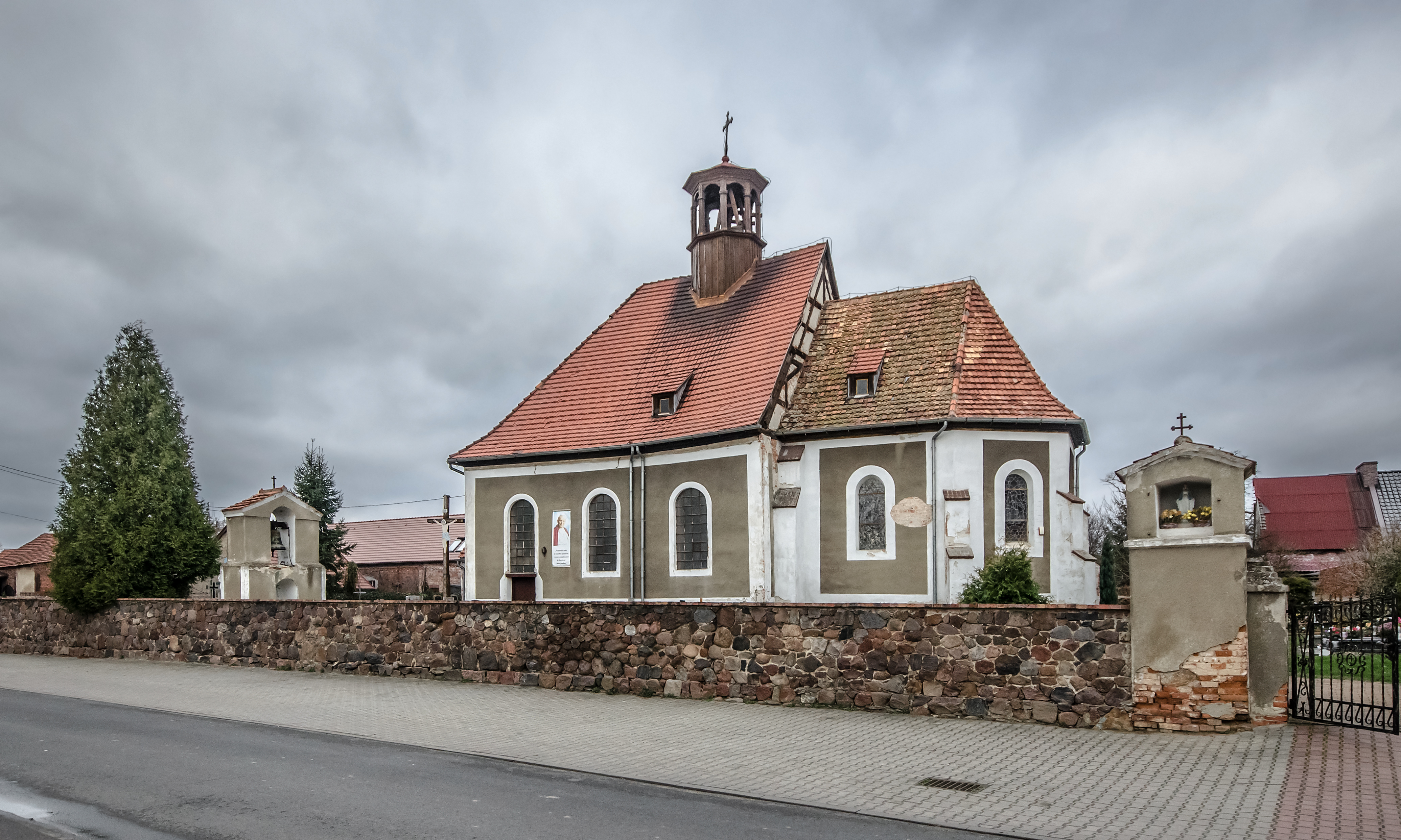 Naborów, kościół fil. p.w. św. Anny, XV, 1 poł. XVIII